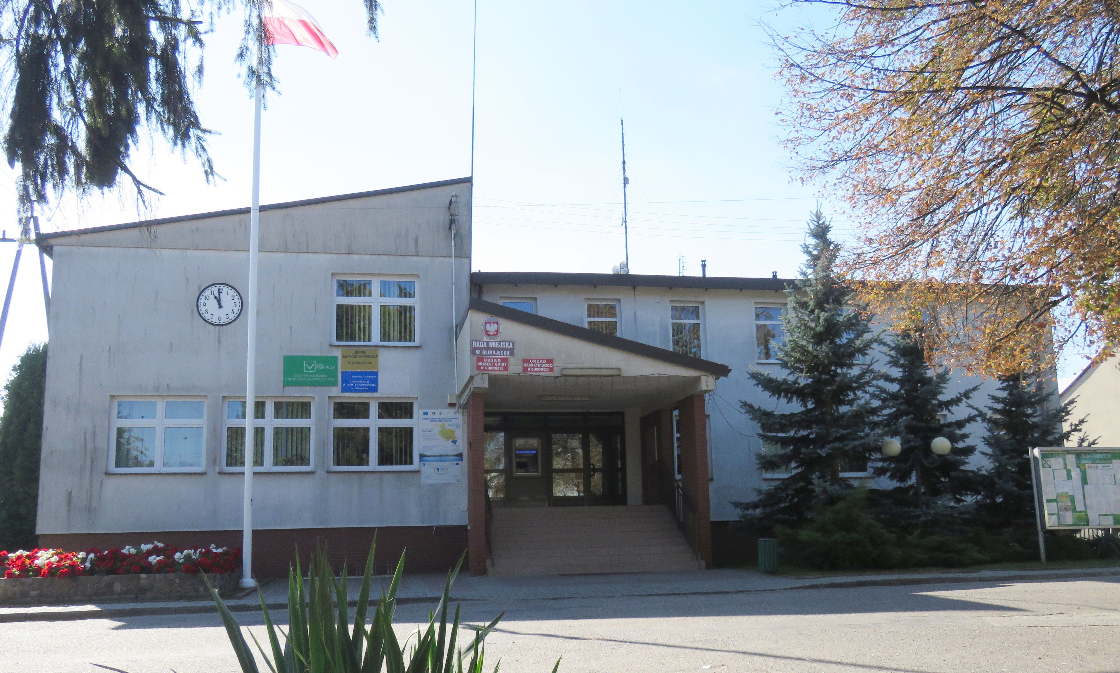 Urząd Miasta i Gminy w Glinojecku